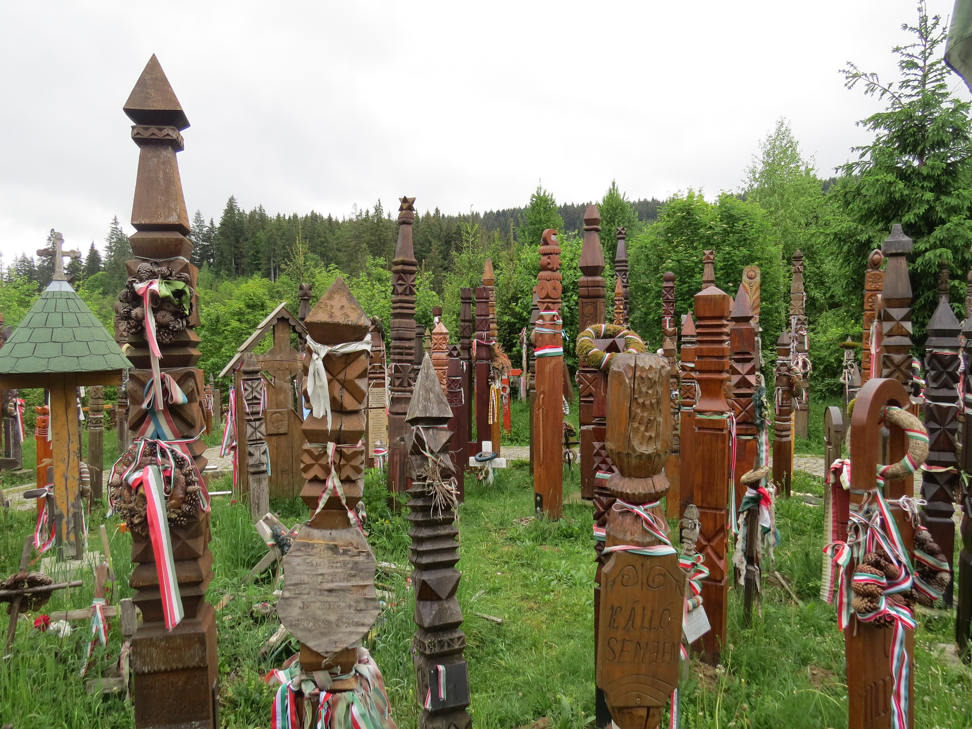 Nyerges-tető, az 1848–49-es forradalom és szabadságharc egyik utolsó székelyföldi csatájának színhelye. Az erdő szélén lévő területen, egy tömegsírba hantolták el akkor az ütközet áldozatait, akiknek emlékét többek közt számtalan kopjafa őrzi.